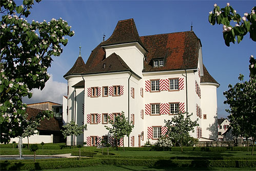 von Blarer-Schloss in Aesch